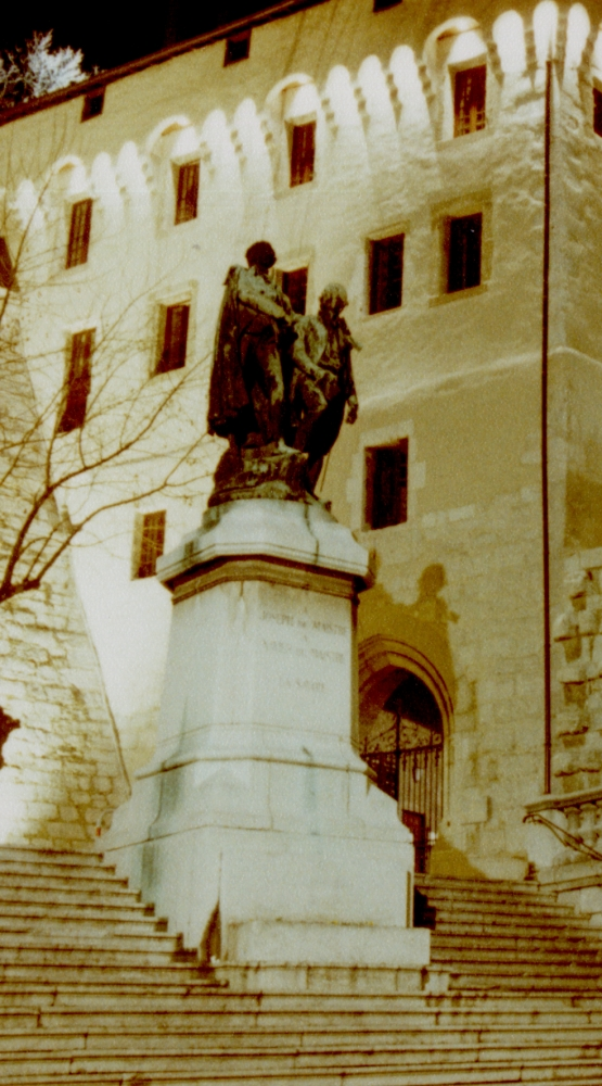 Chambéry by night, Mémorial de Joseph et Xavier de Maistre au Château de Chambéry, sculpteur Ernest Henri Dubois (1863-1930), installé en 1899.